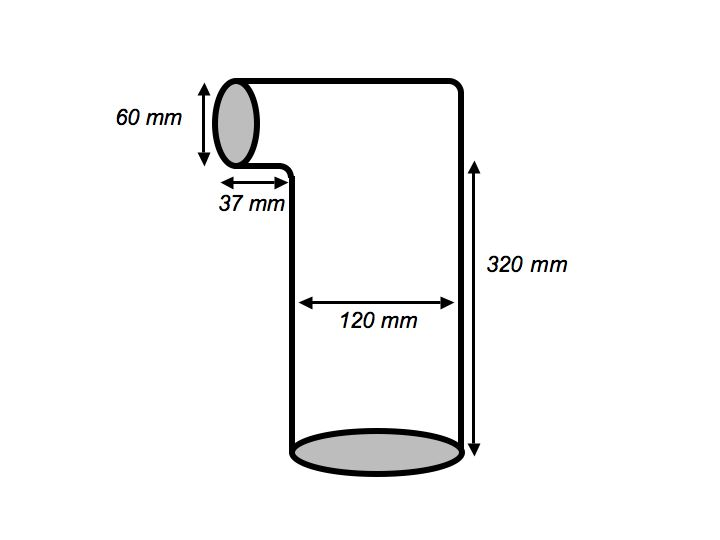 Schéma d'un nid de Melanerpes herminieri d'après Pascal Villard, The Guadeloupe woodpecker and other islands melanerpes, Brunoy, Société d'études ornithologiques de France, 1999, ISBN 978-2-9506548-6-1